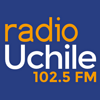 Logo de la Radio Universidad de Chile (2013).